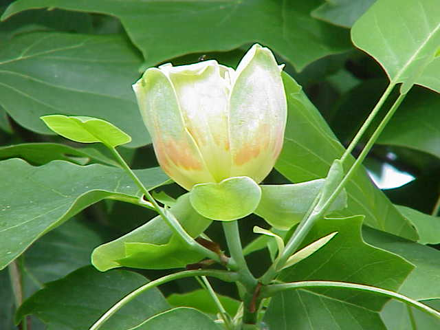 Species: Liriodendron tulipifera Family: Magnoliaceae Image No. 4